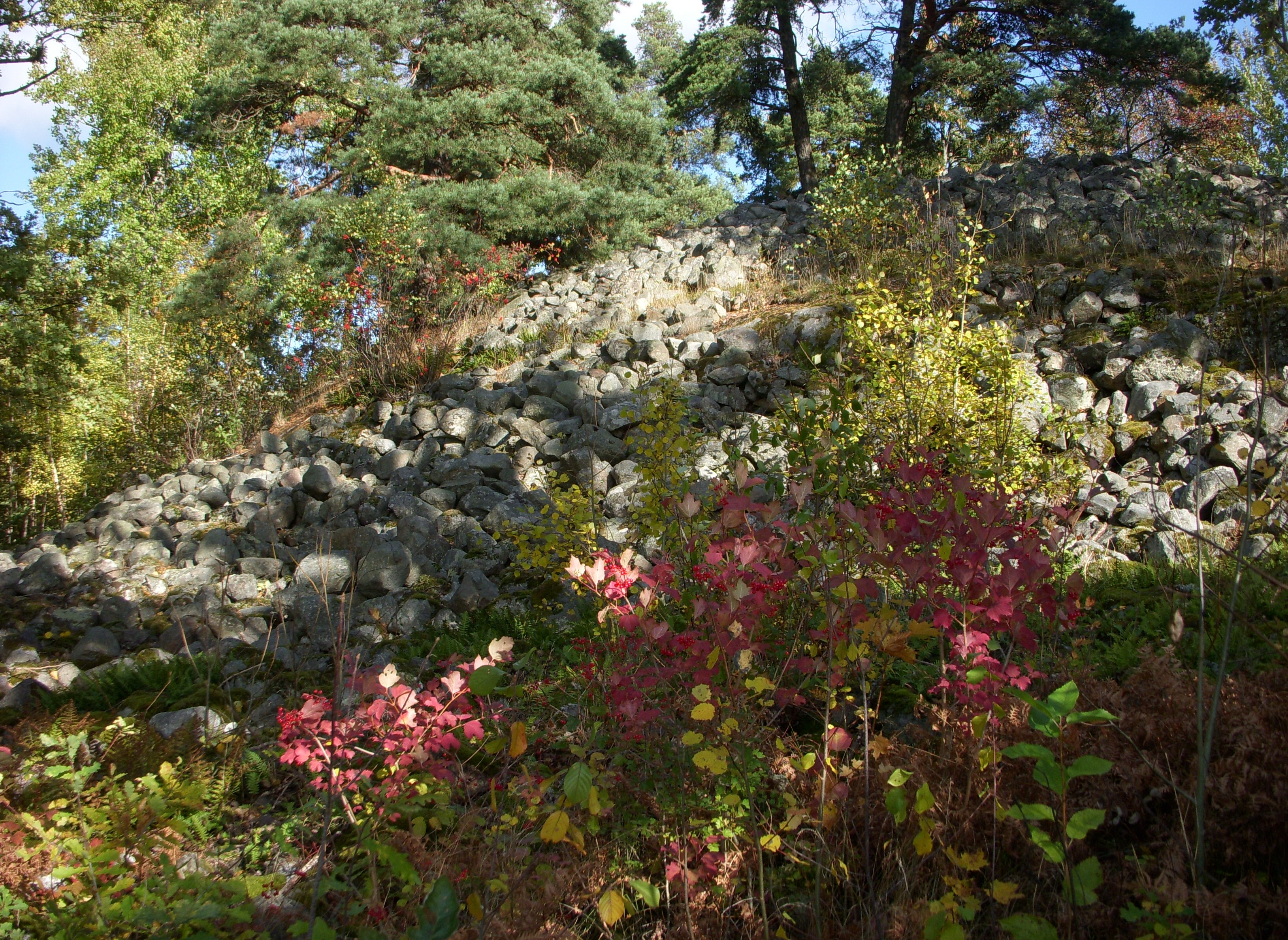 Hallunda kulturstig i Botkyrka, gravröse RAÄ - Botkyrka 70:1